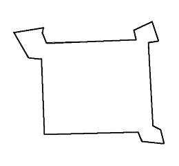 Noort_Holland_Fort.jpg